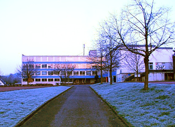 Realschule Bergneustadt Rückansicht